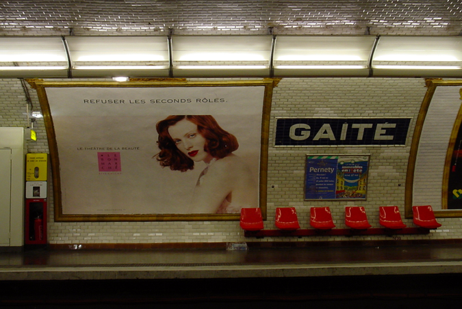 Gaîté metro station